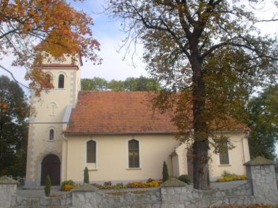 Kościół w Gołębicach